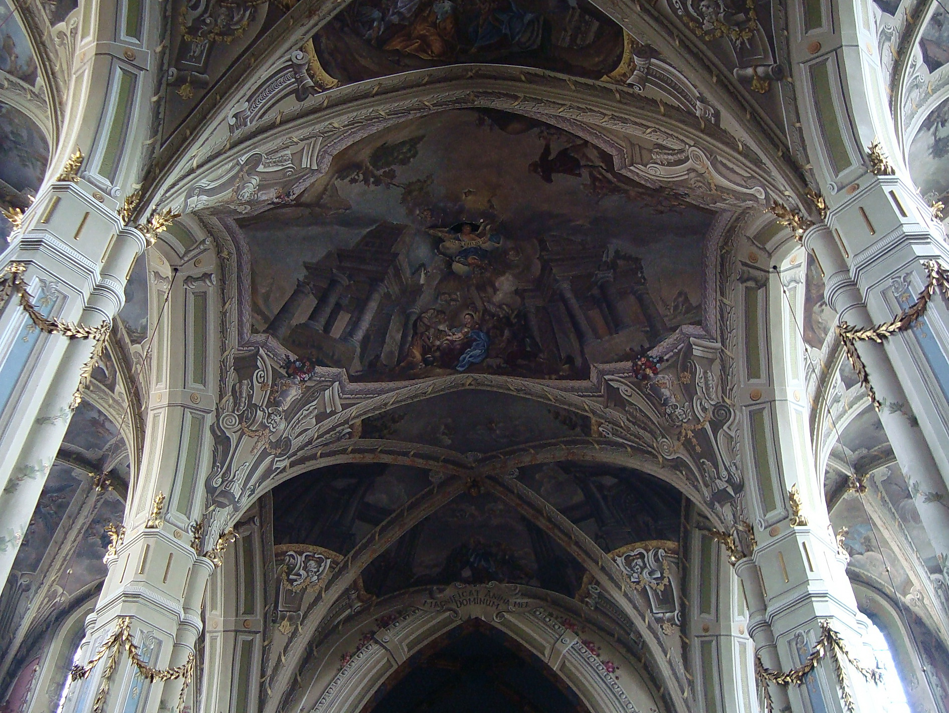 собор Кафедральний, Львів, Катедральна пл., 1